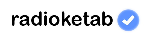 رادیو کتاب اولین وب سایت رادیویی در حوزه آموزش